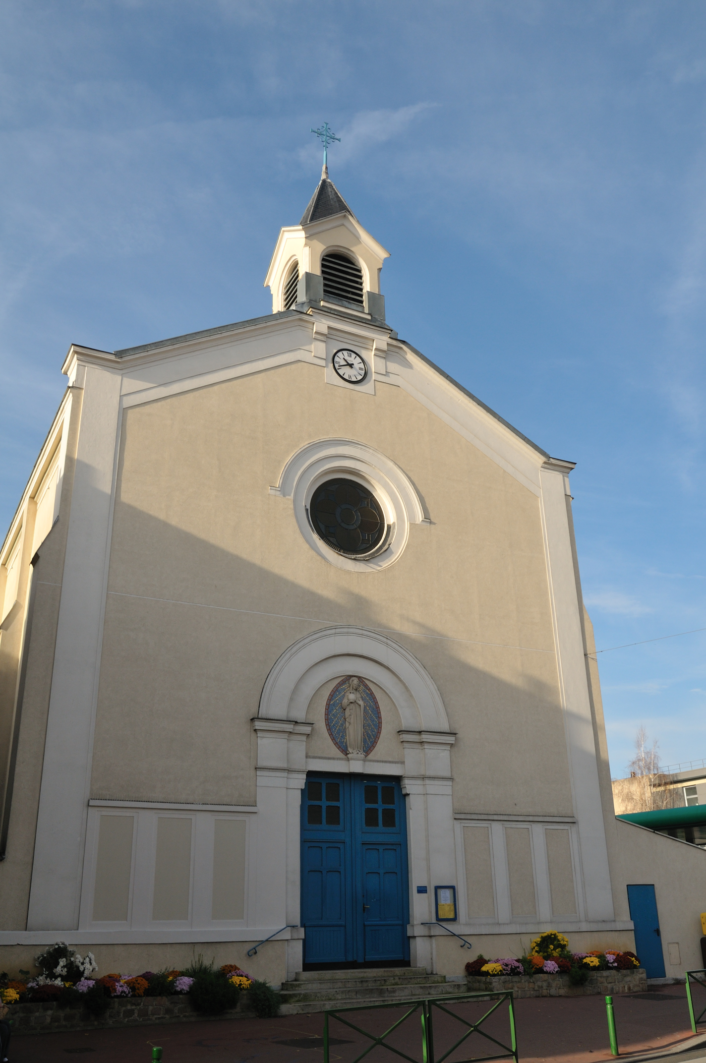 Église Notre-Dame-de-la-Médaille-Miraculeuse, Malakoff, Hauts-de-Seine, France